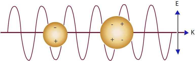 ננוחלקיקים המתנהגים כדיפול וכקוואדרופול